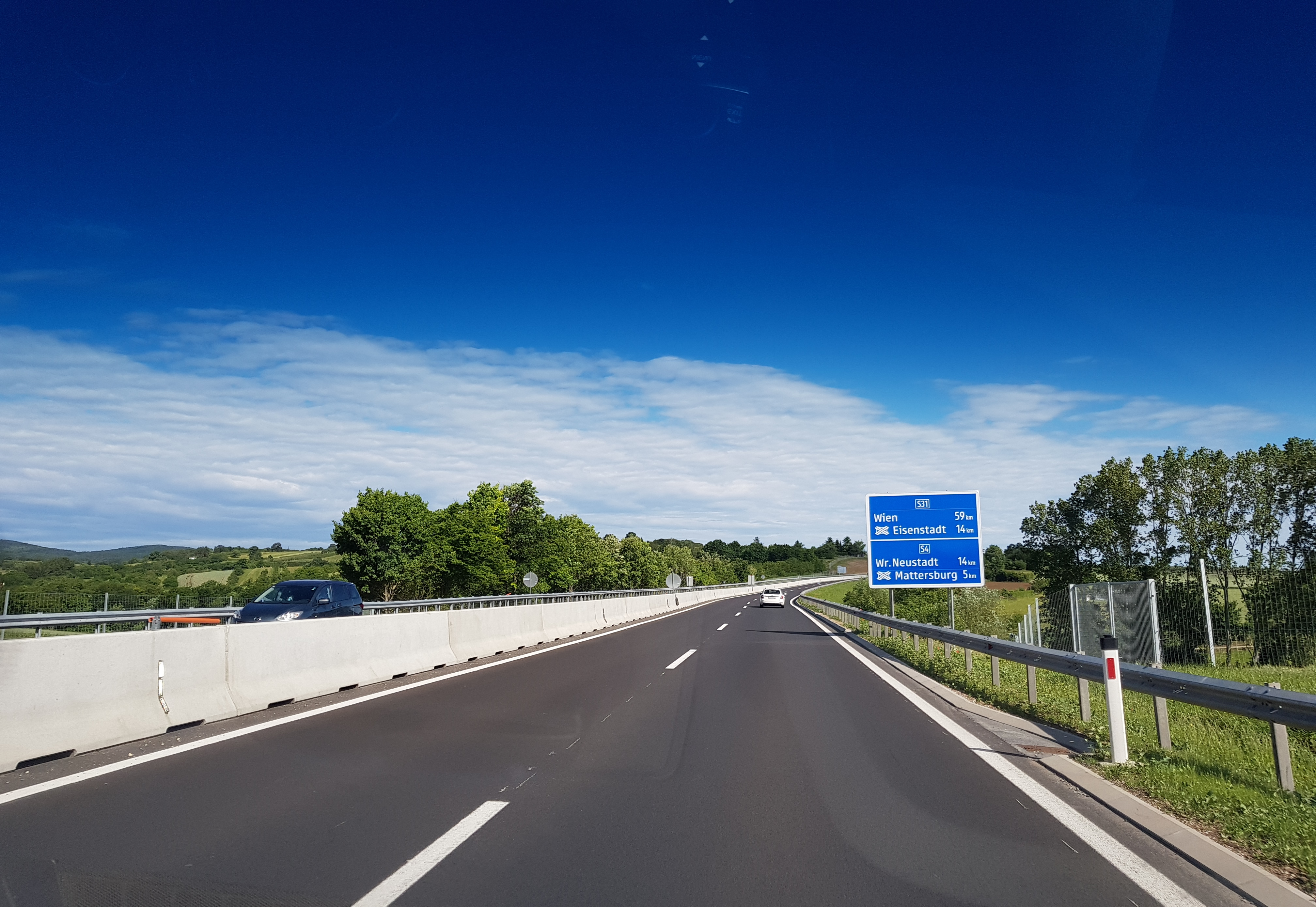 Burgenland Schnellstrasse bei Mattersburg Umbaustrecke